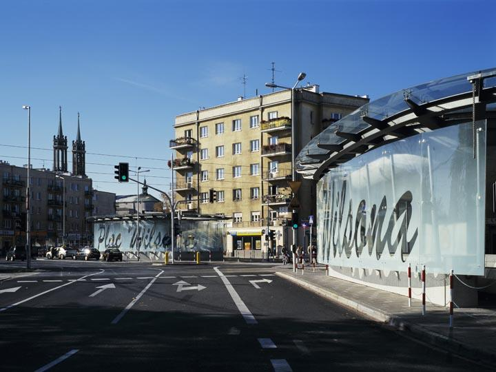 Stacja Metra A18 Plac Wilsona